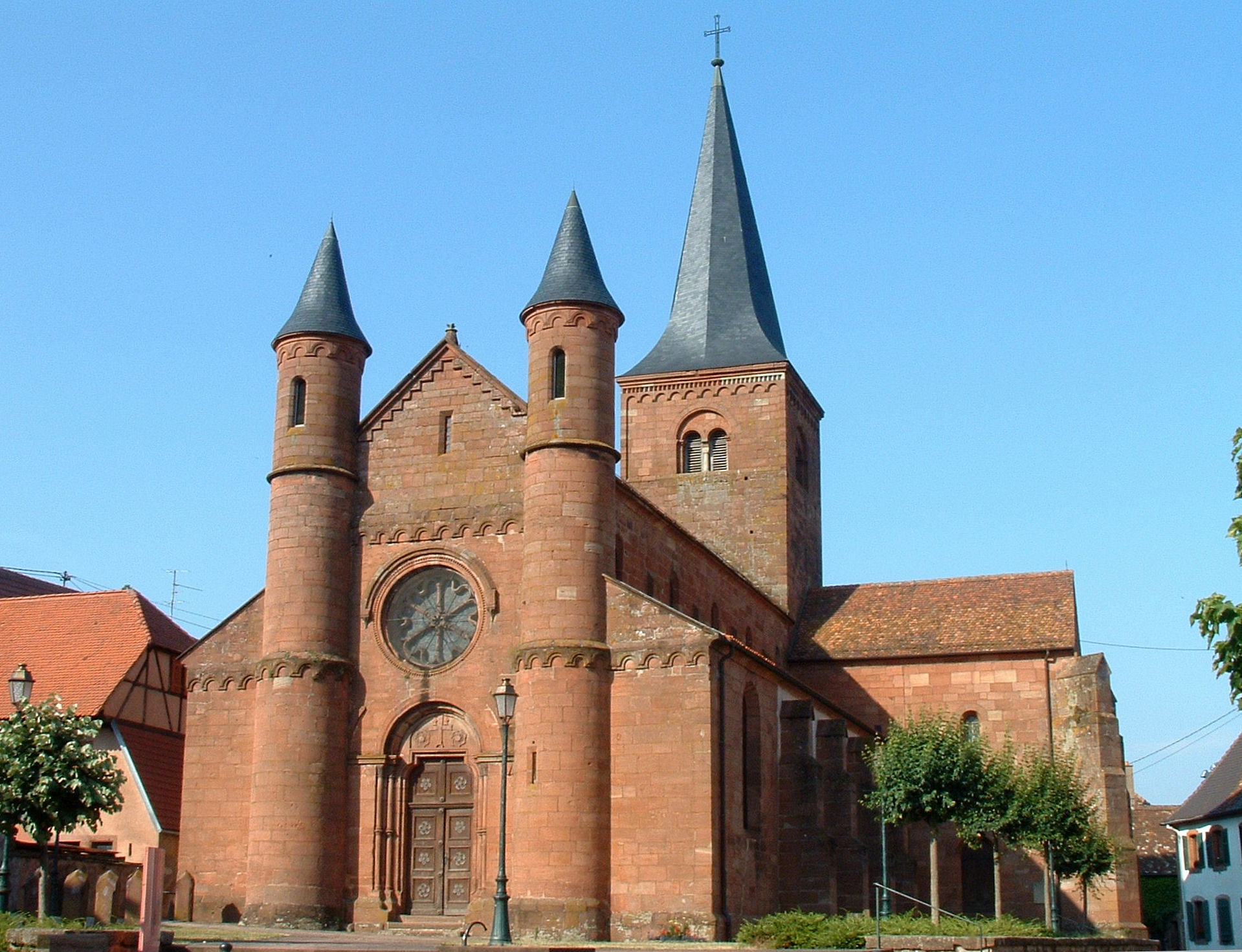 Neuwiller-lès-Saverne - Eglise Saint-Adelphe